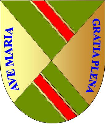 Escudo desconocido, sin referencias